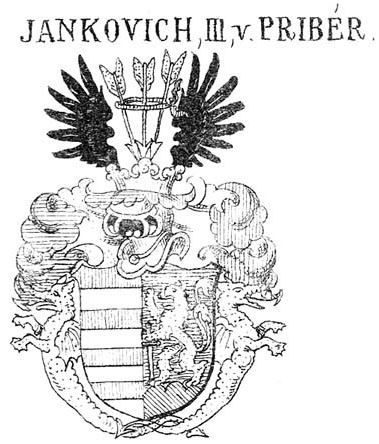 A pribéri és vuchini Jankovich, ill. a pribéri, vuchini és dunaszecskői gróf Jankovich család címere